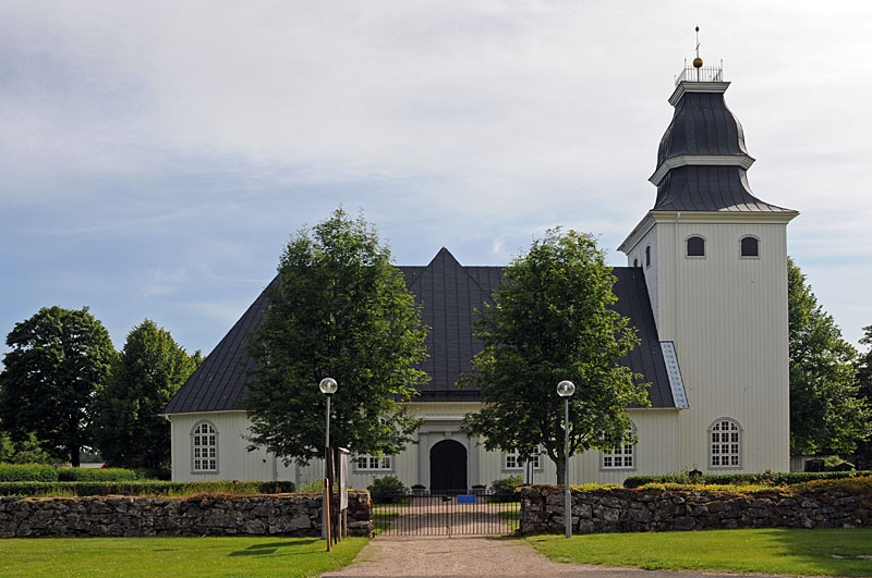 Ransäters kyrka i Munkfors-Ransäters församling i Karlstads stift